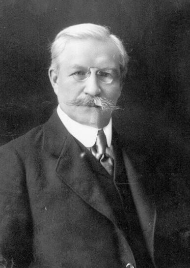 Портрет министра иностранных дел Временного правительства первого состава П.Н.Милюкова.